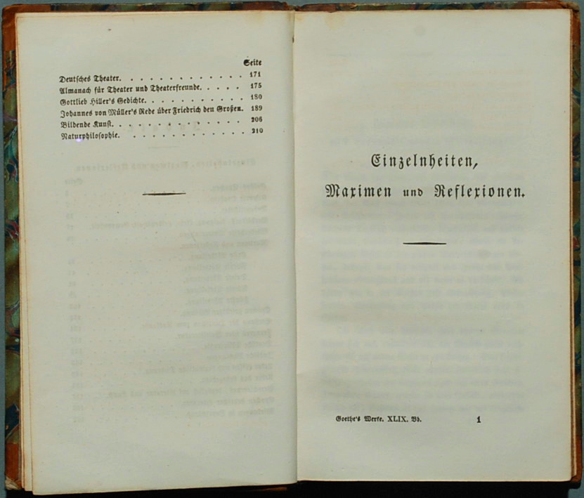 Johann Wolfgang Goethe: Einzelheiten, Maximen und Reflexionen. Stuttgart und Tübingen, in der J. G. Cotta'schen Buchhandlung. 1833. 211 Seiten + 1 Seite Druckvermerk. Vollständige Ausgabe letzter Hand. Neun und vierzigster Band. Hrsg. von J. P. Eckermann und F. W. Riemer. Hagen C3 (Nr. 24) 49